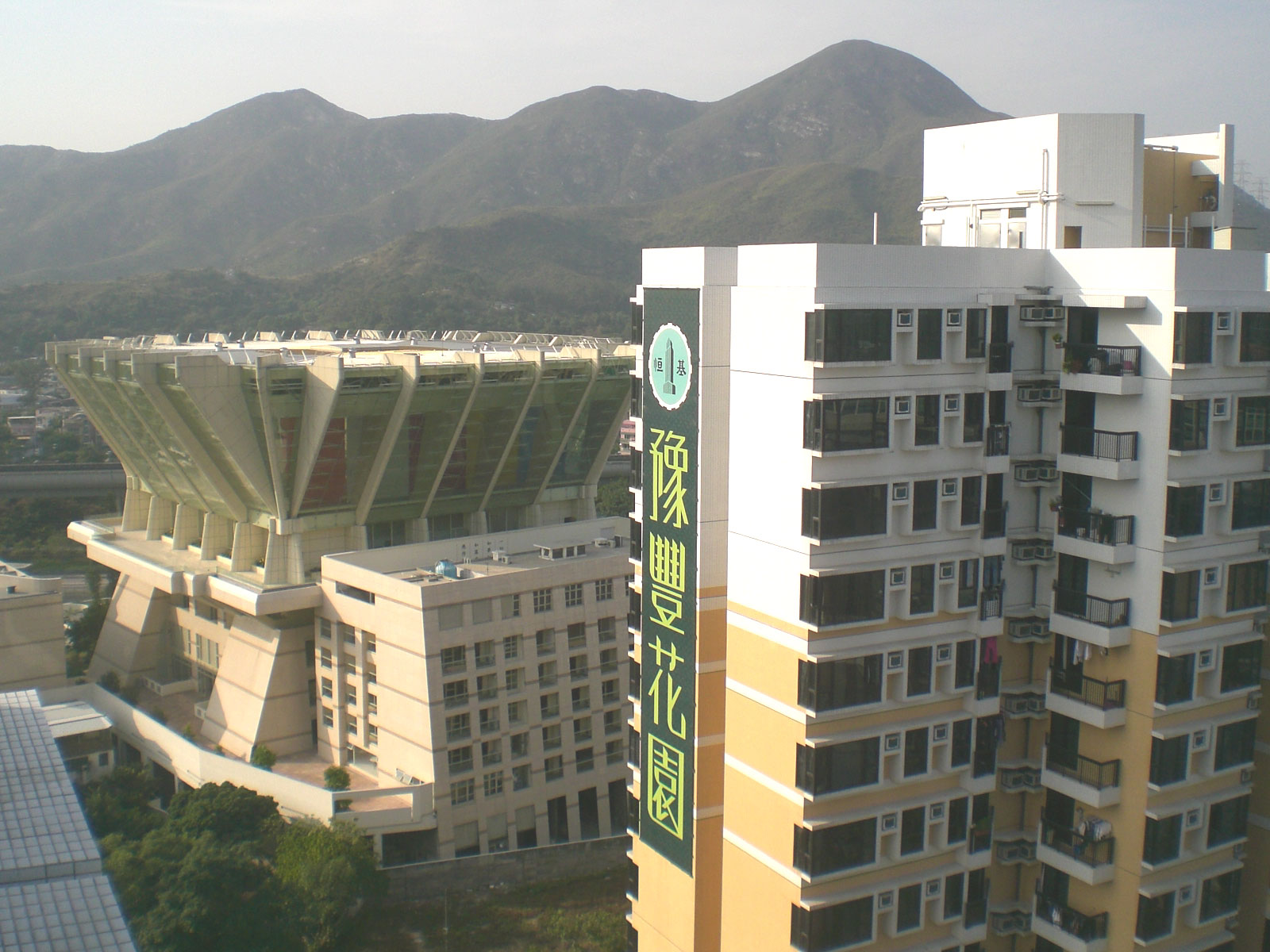 豫豐花園近妙法寺